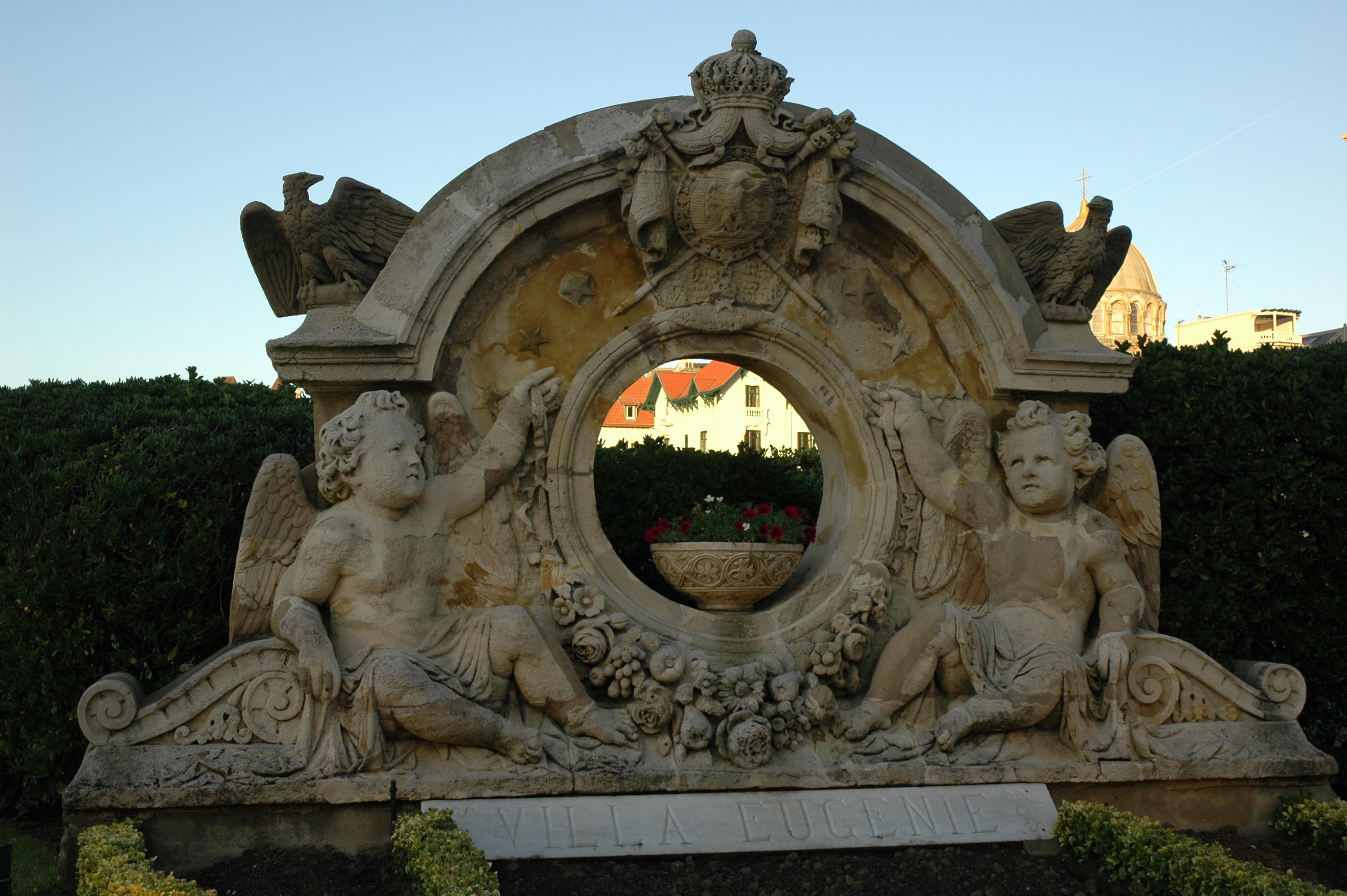 Biarritz, monument à l'entrée de la villa Eugénie